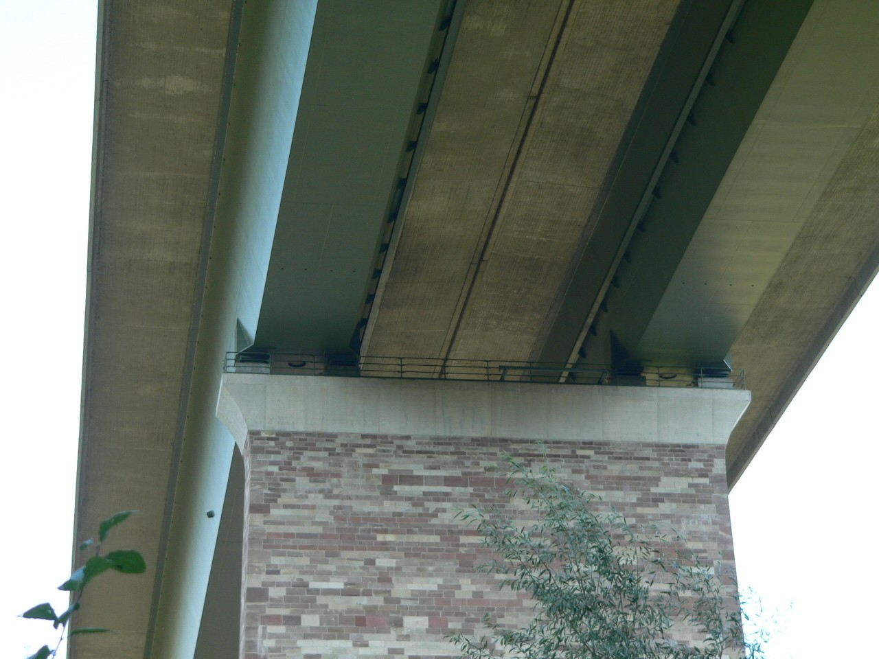 Stuetzenkopf der Werratalbruecke der ICE-Strecke Wuerzburg - Hannover.